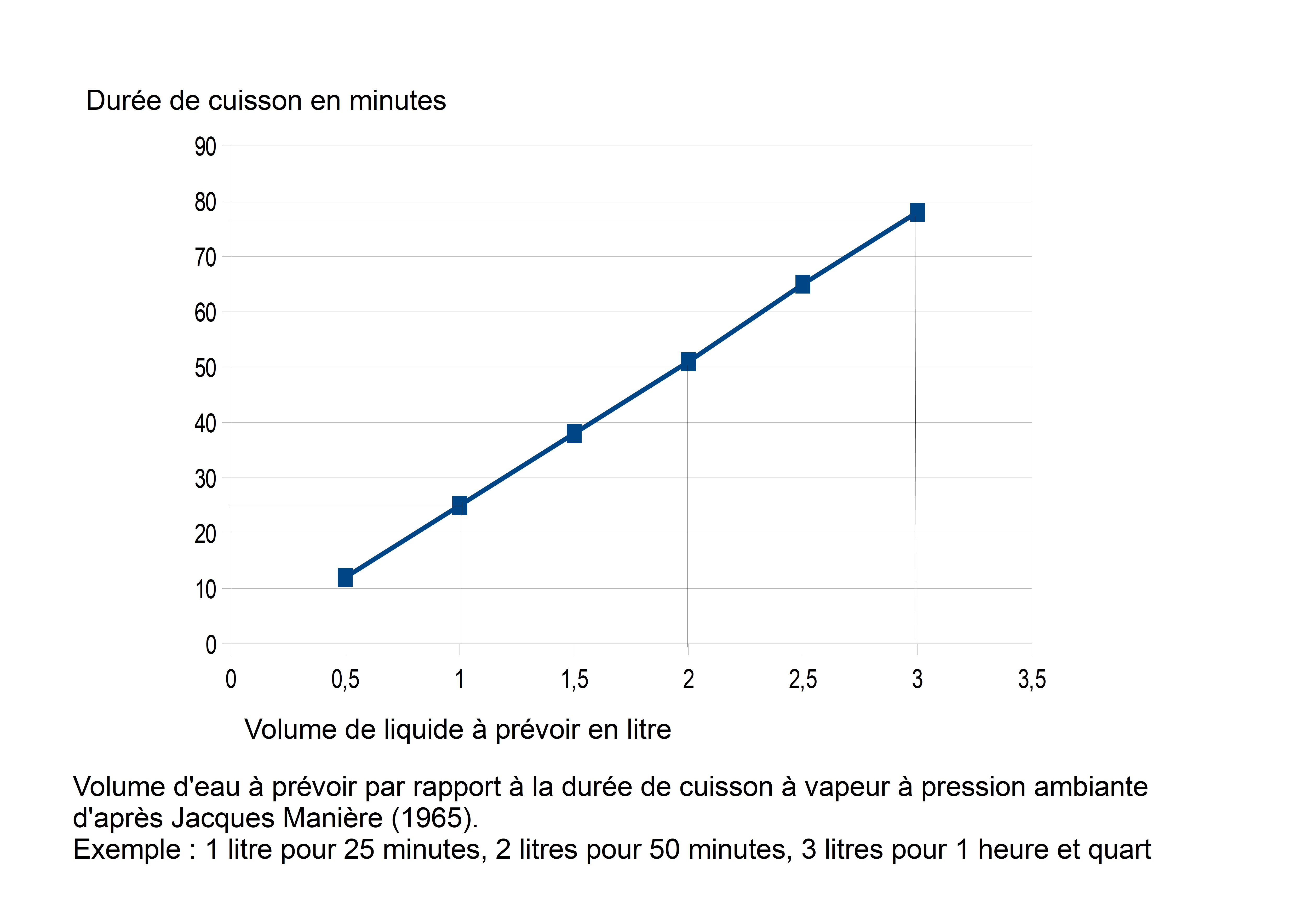 rapport entre le volume d'eau et la durée de cuisson à la vapeur d'après Jacques Manière 1965